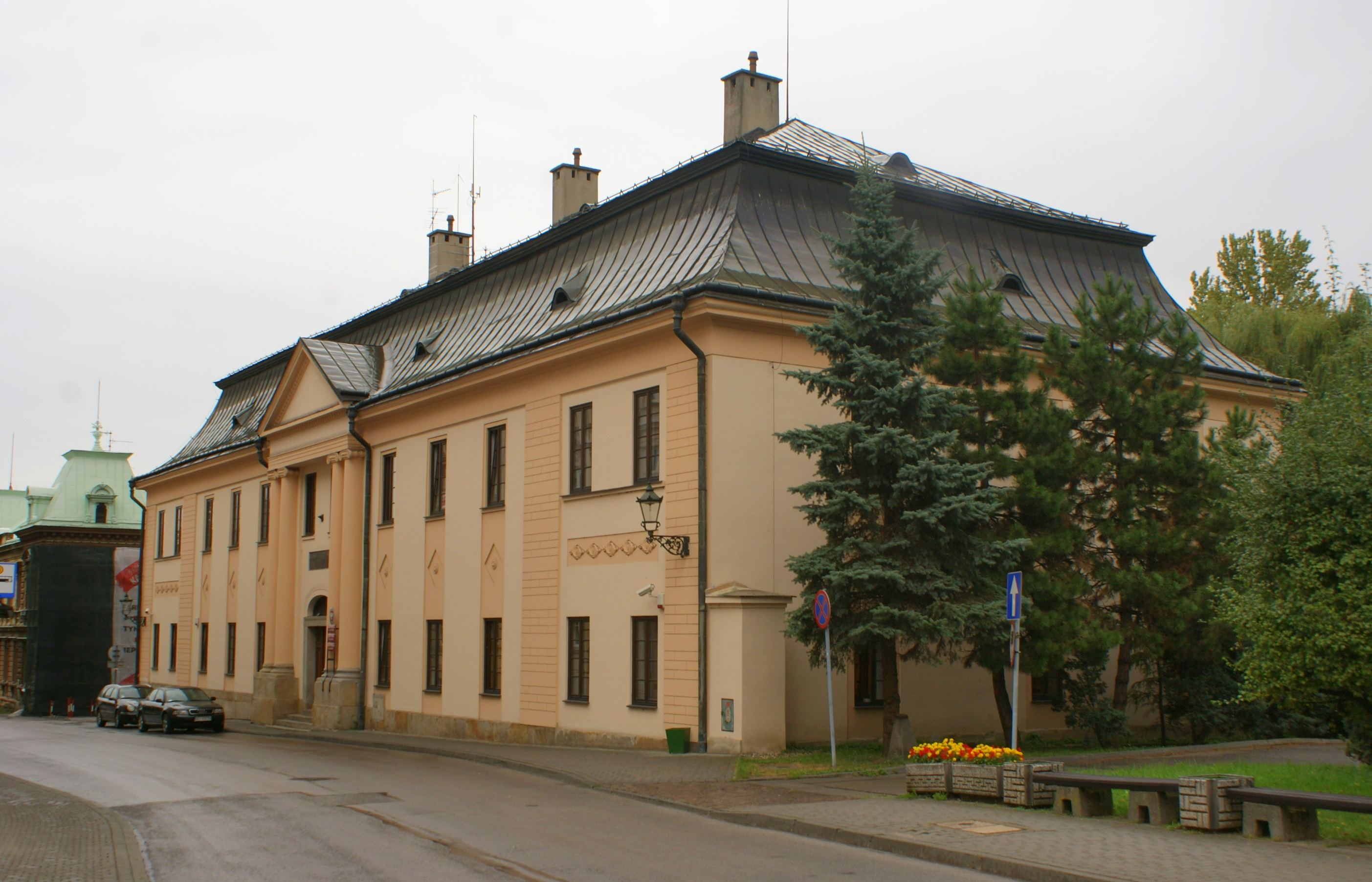 Budynek dawnego konwiktu przypisany był do dzielnicy Górne Przedmieście z numerem konskrypcyjnym. Zabytkowy obiekt wybudowano w 1824 roku w architekturze klasycystycznej z mansardowym dachem, kolumnowym portykiem i trójbocznym przyczółkiem. Konwikt przeznaczono dla młodzieży szlacheckiej uczącej się w cieszyńskich szkołach. Obecnie w budynku zlokalizowana jest siedziba Urzędu Stanu Cywilnego.